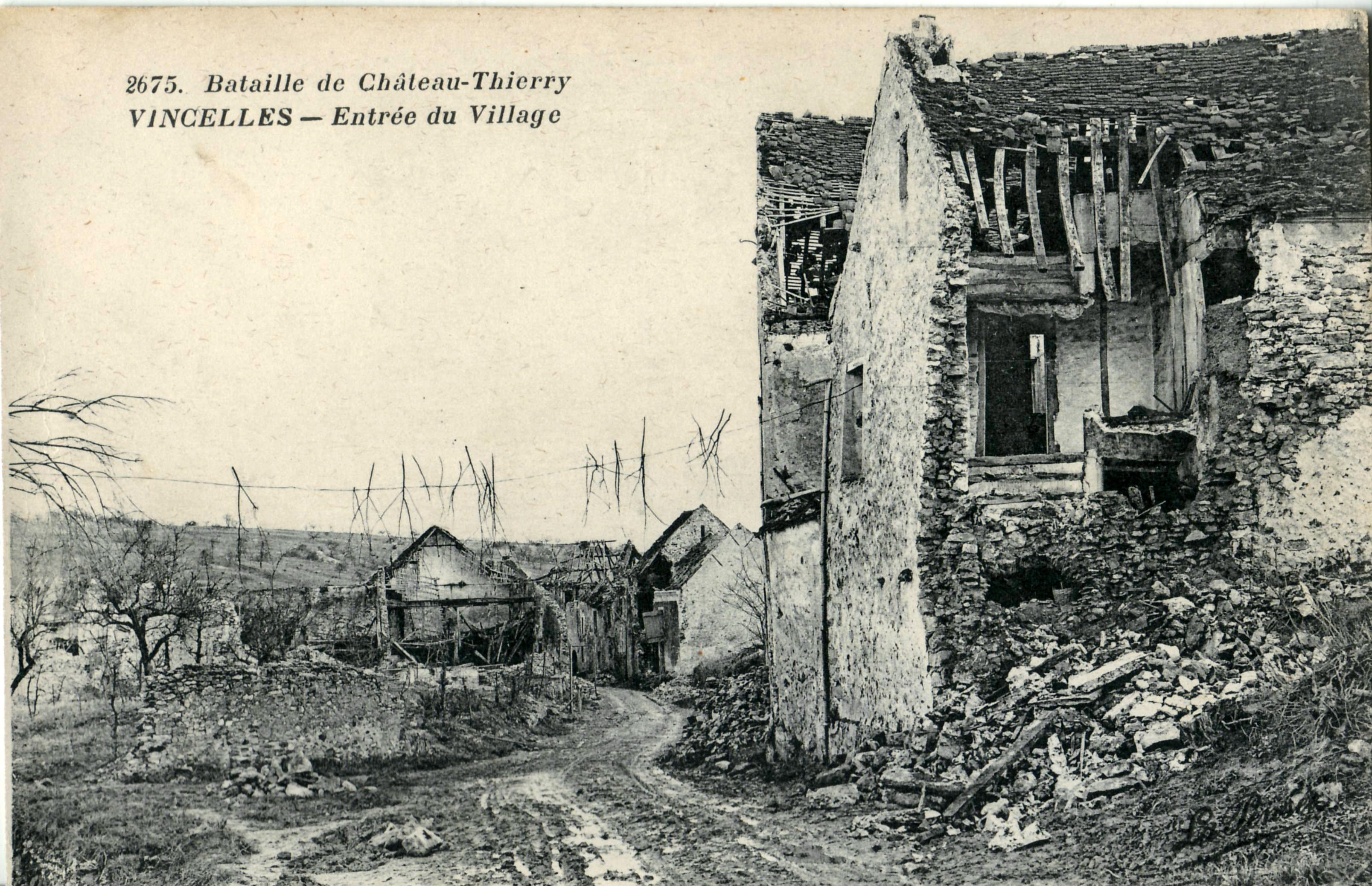 Carte postale ancienne éditée par La Pensée, n°2675 :VINCELLES - Entrée du Village